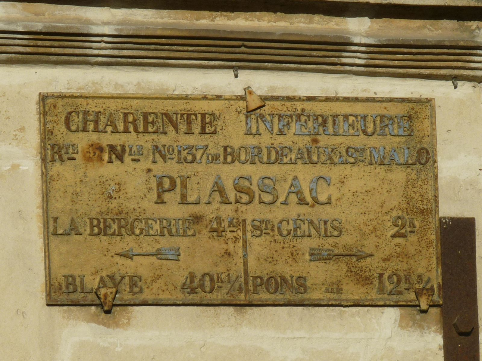 ancienne plaque de route N.137 à Plassac (17), France.